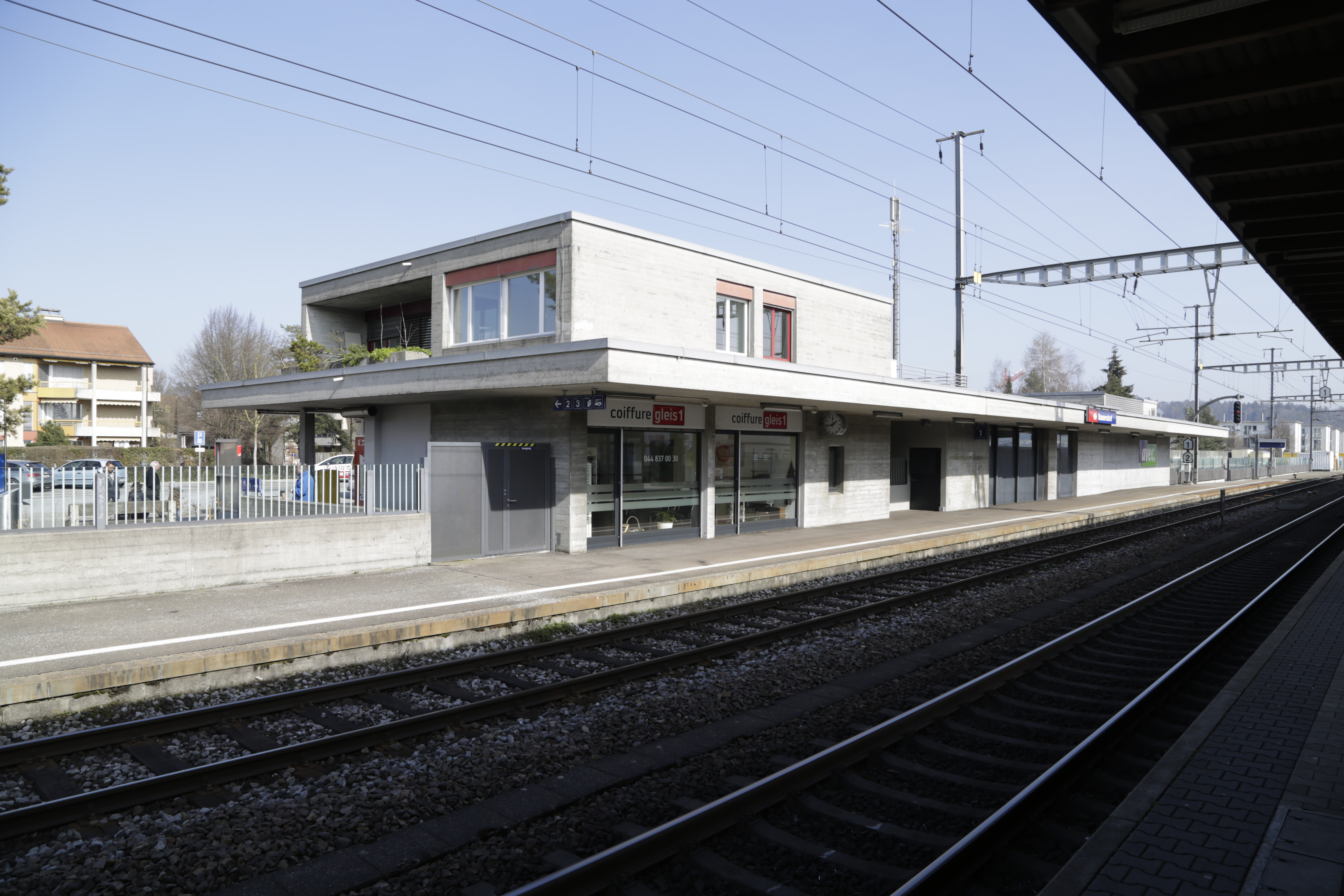 Der neue Bahnhof Basseresdorf von 1980